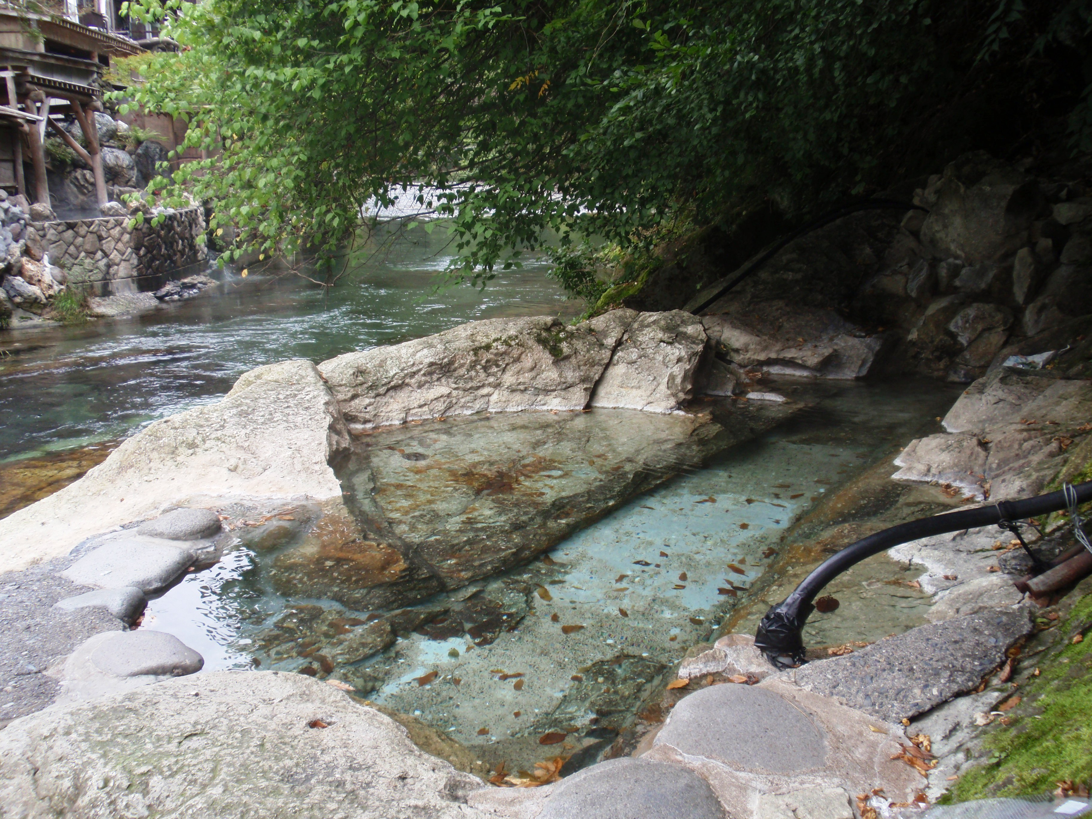 栃木県日光市湯西川温泉の野湯、薬研の湯